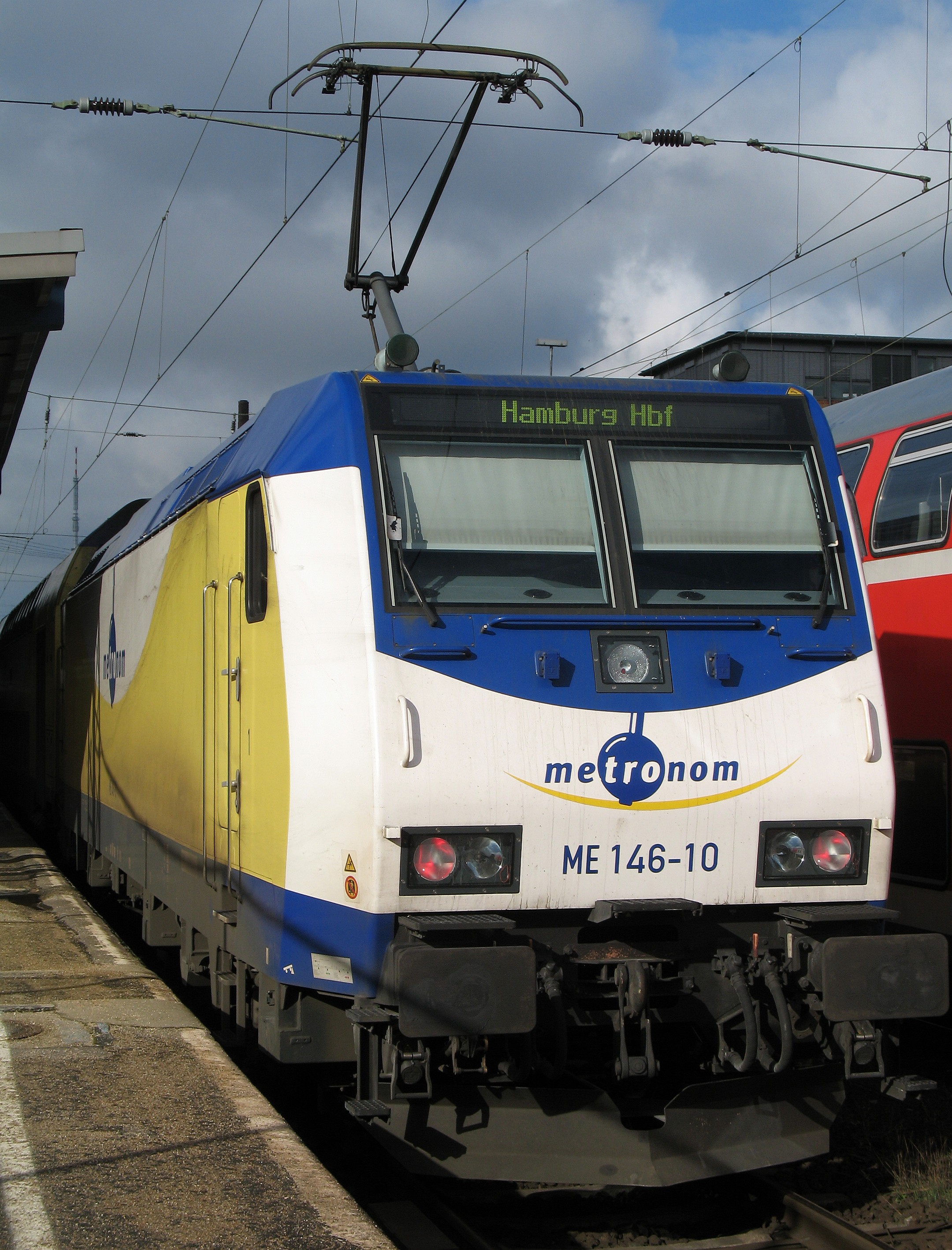 Lokomotive "Bad Bevensen" der metronom Eisenbahngesellschaft in Bremen-Hauptbahnhof